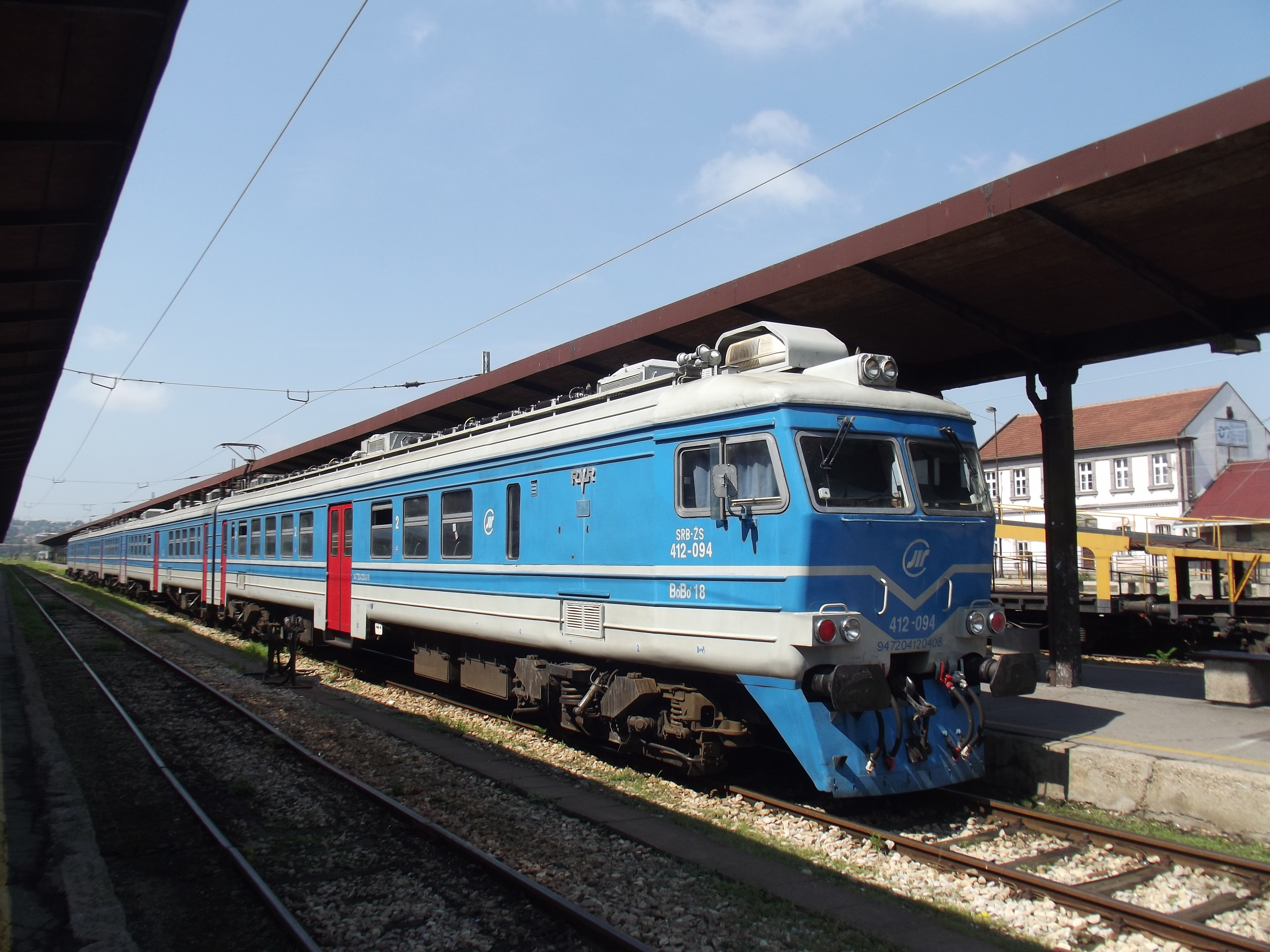 Elektrisch treinstel in Belgrado